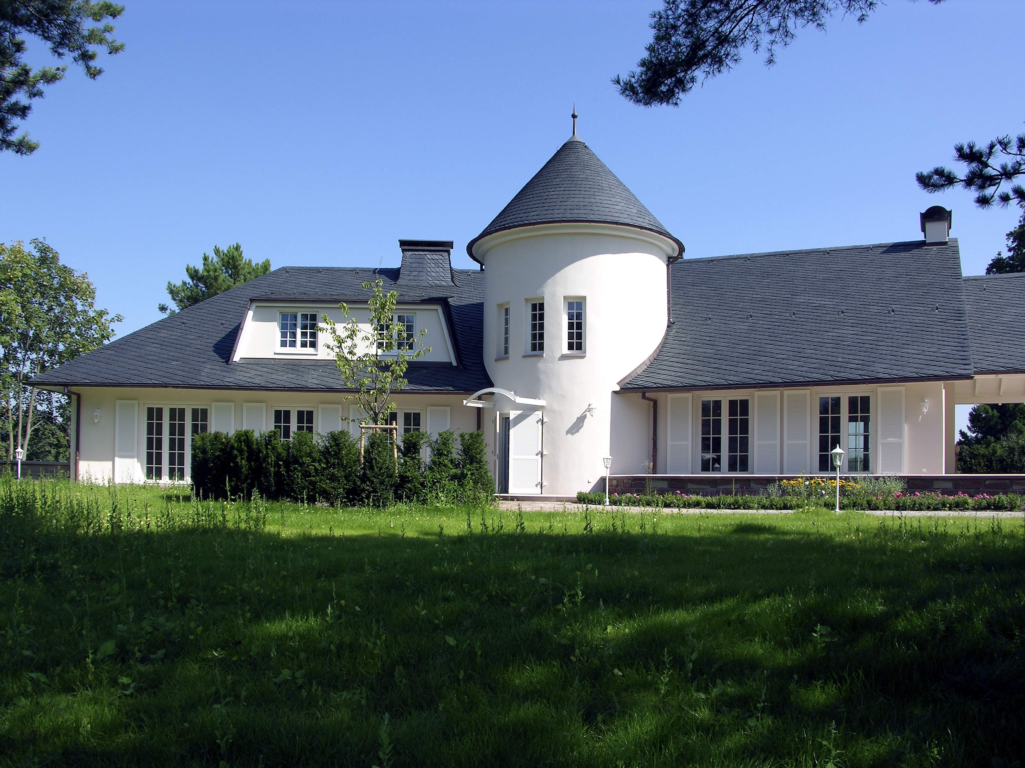 Bildbeschreibung: Einfamilienhaus eingedeckt mit Moselschiefer aus der Eifel Fotograf/Zeichner: Stefanie Lindener Datum: 24.05.2006